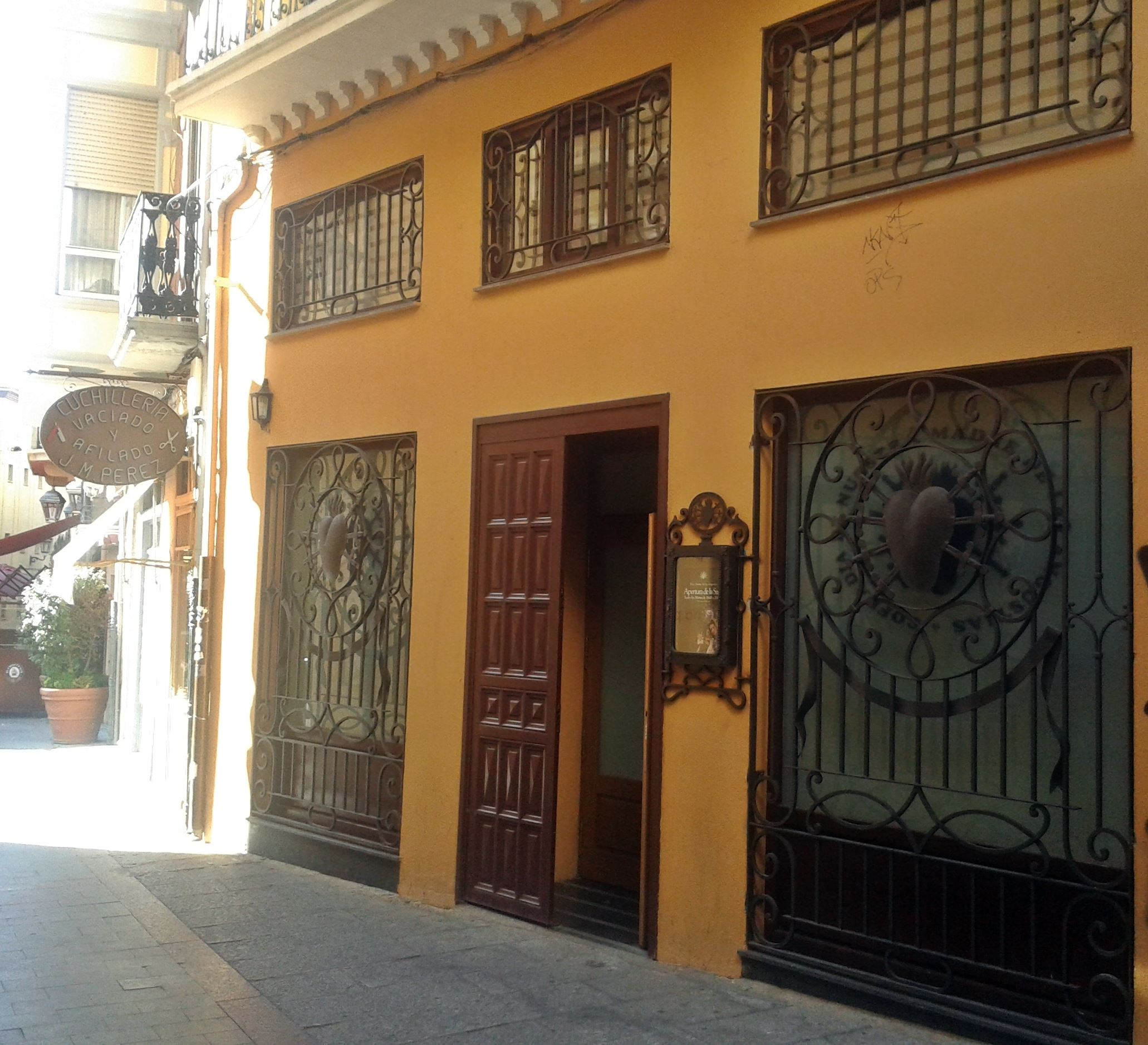 Detalle de la fachada de la Sede de la Cofradia de Nuestra Madre de las Angustias en la Calle Quebrantahuesos nº6 de Zamora.